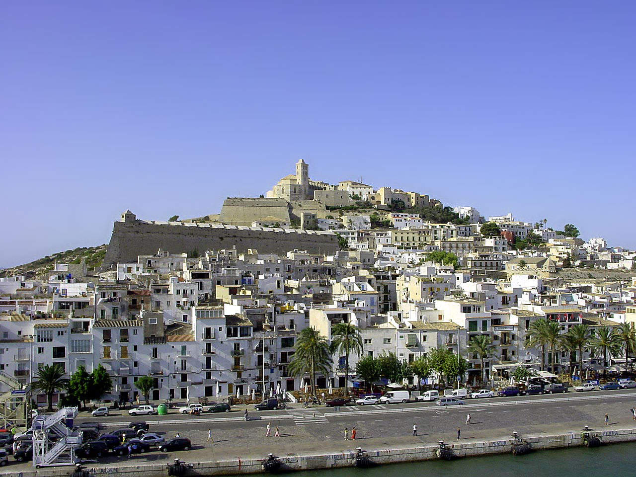 Ibiza Stadt vom Meer aus gesehen.